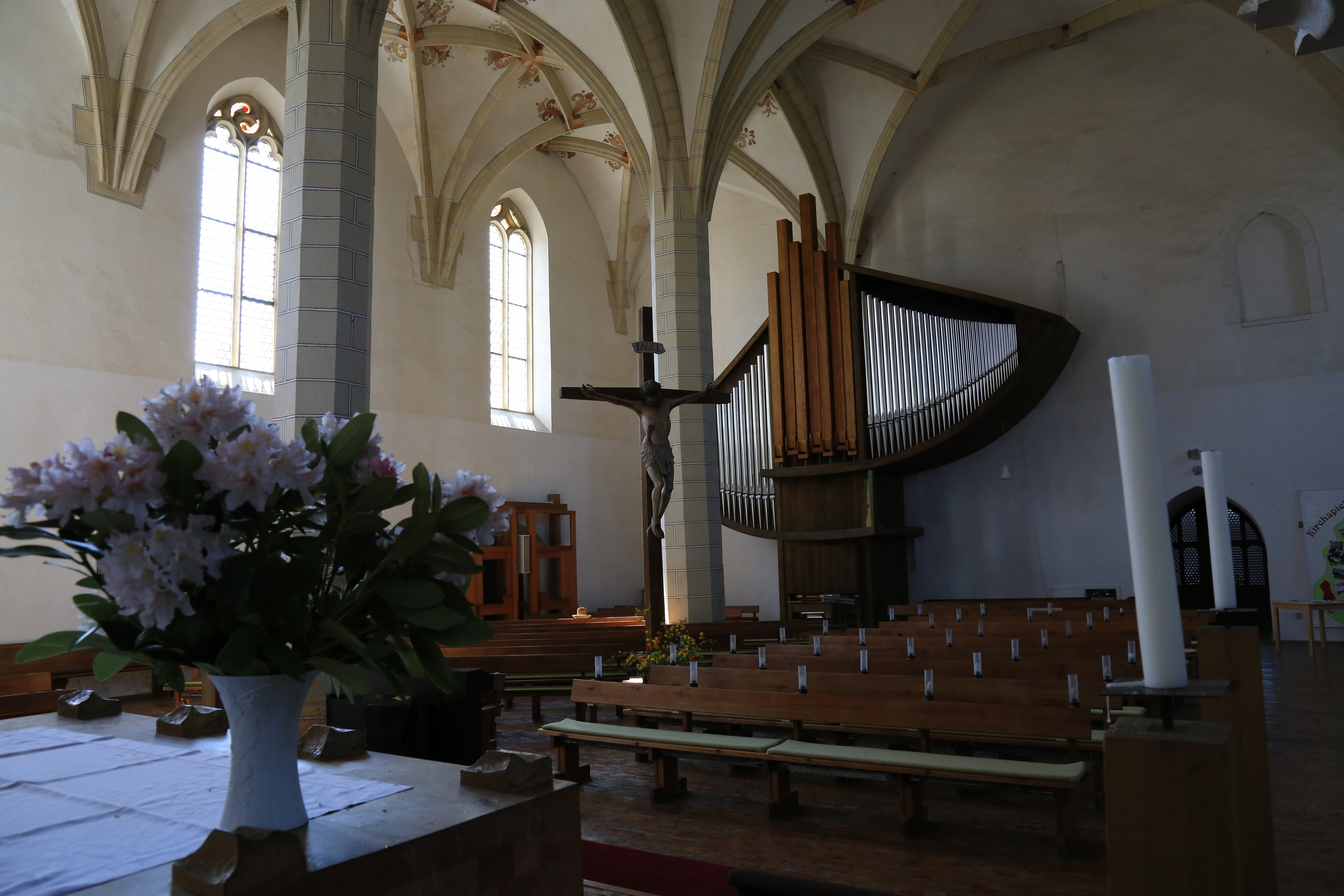 Göda Kirche April 2017 (16) Hornjoserbsce: Ewangelska cyrkej swjateju Pětra a Pawoła w Hodźiju